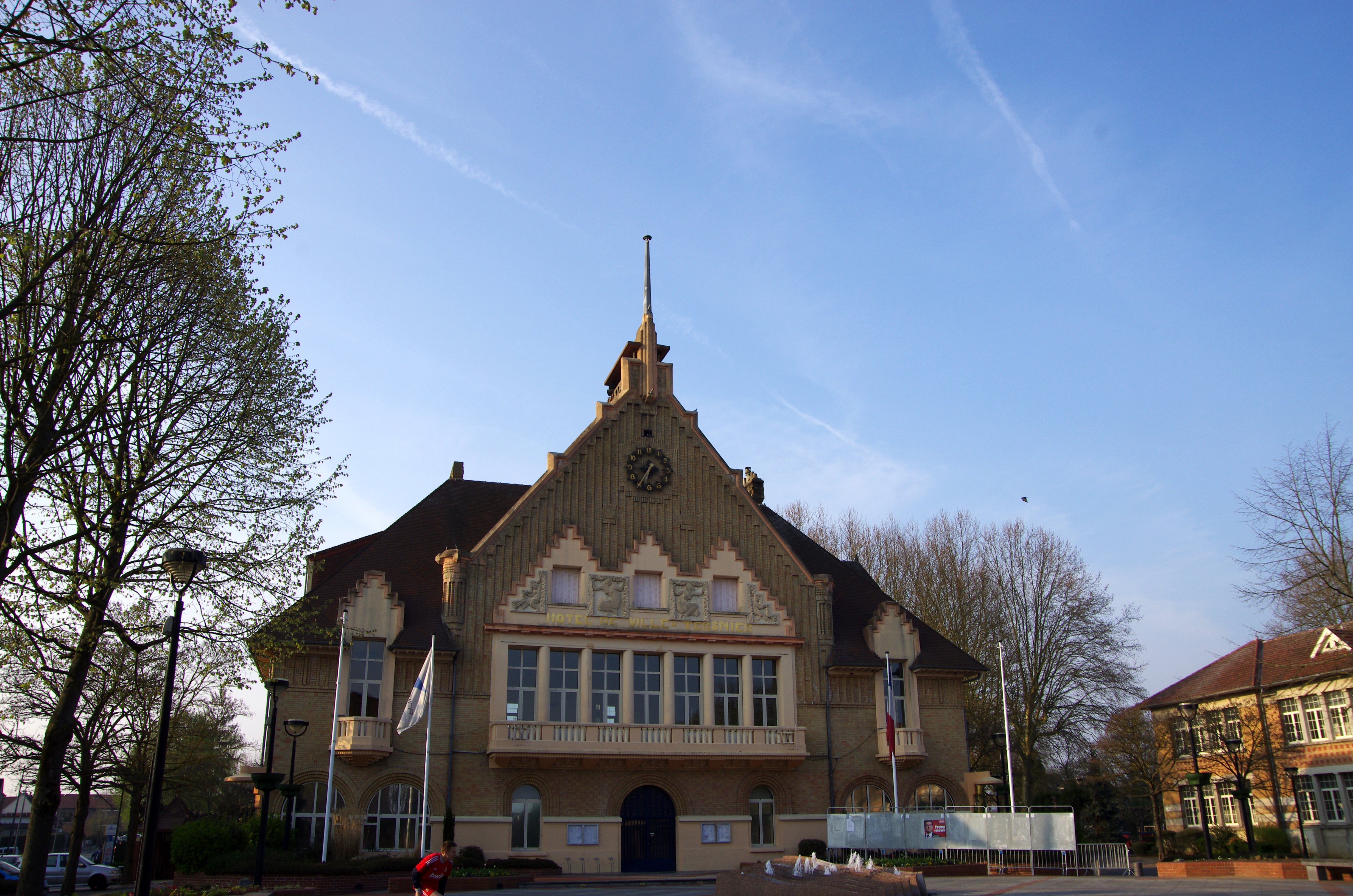 Tergnier (Aisne, France) - L'hôtel-de-ville (Place Paul Doumer). Ce bâtiment public ne doit pas être confondu avec les mairies annexes de Fargniers, de Quessy et de Vouël. .